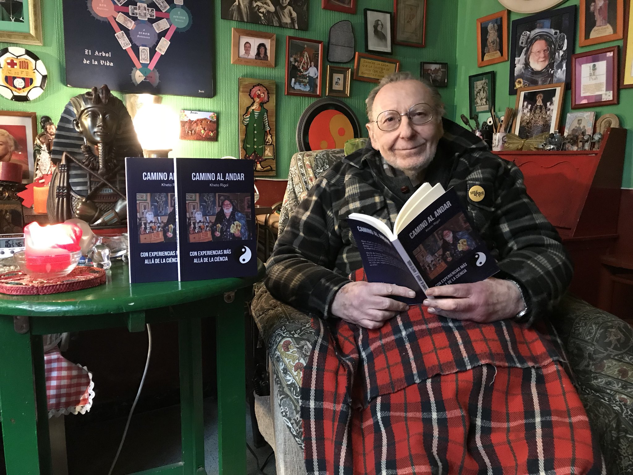 Enric Pons i Rigolfas, dibuixant i tarotista català, amb el seu llibre "Camino al andar".